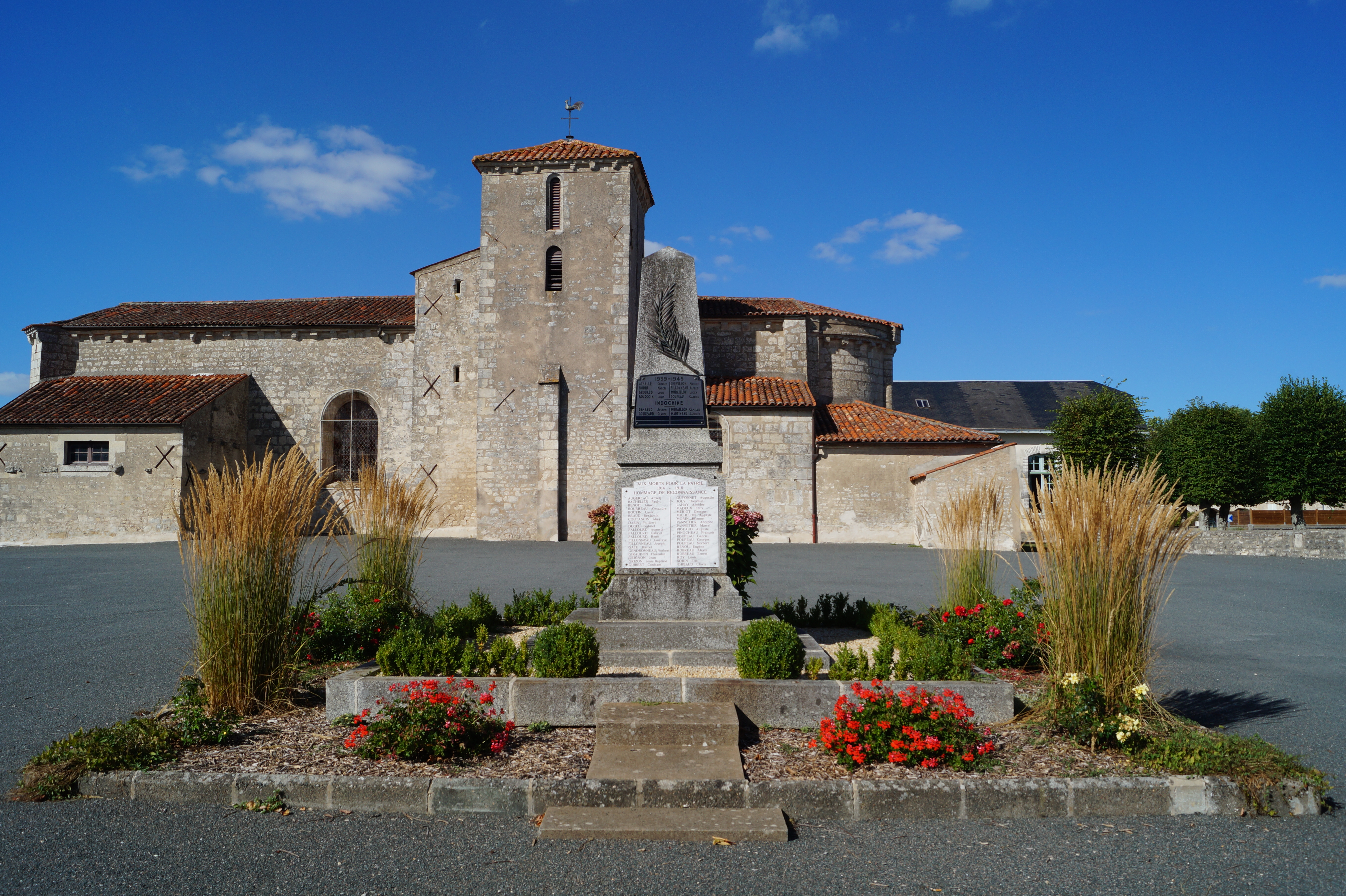 L’église Notre-Dame-de-l’Assomption et le monument aux morts de Montreuil.